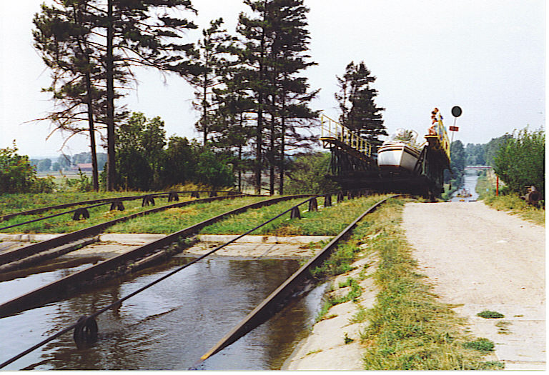 Boat Lift on the Elblag Canal - moje foto (own picture)